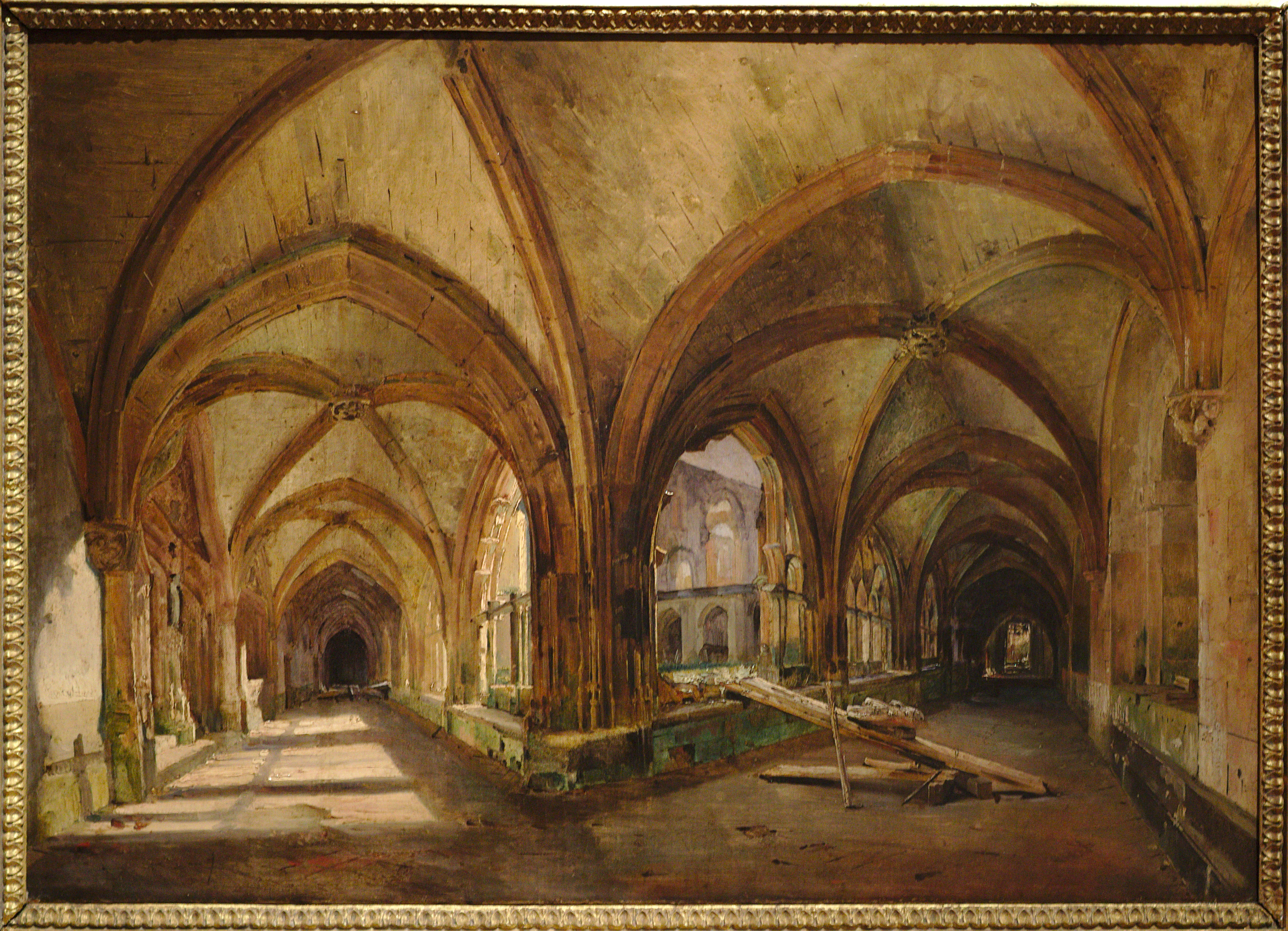 La toile représente le cloître de l'abbaye de Saint-Wandrille, en Normandie (région de France), dans l'état d'abandon où il se trouvait à l'époque. Eugène Isabey s'était intéressé à l'abbaye de Saint-Wandrille depuis sa participation en tant qu'illustrateur au livre "Voyages pittoresques et romantiques dans l'ancienne France" en 1820. Isabey s'attache dès lors à révéler et à mettre en valeur un patrimoine architectural alors menacé de disparition. Ce tableau illustre le goût européen de l'époque pour l'architecture médiévale. Le courant artistique du romantisme, influencé par le roman anglais du XVIIIe siècle, s'intéresse aux ruines auxquelles il confère une valeur esthétique propre. La manière d'Eugène Isabey dans cette toile relève du romantisme. Il a été influencé dans son style par la peinture anglaise, découverte en 1825.